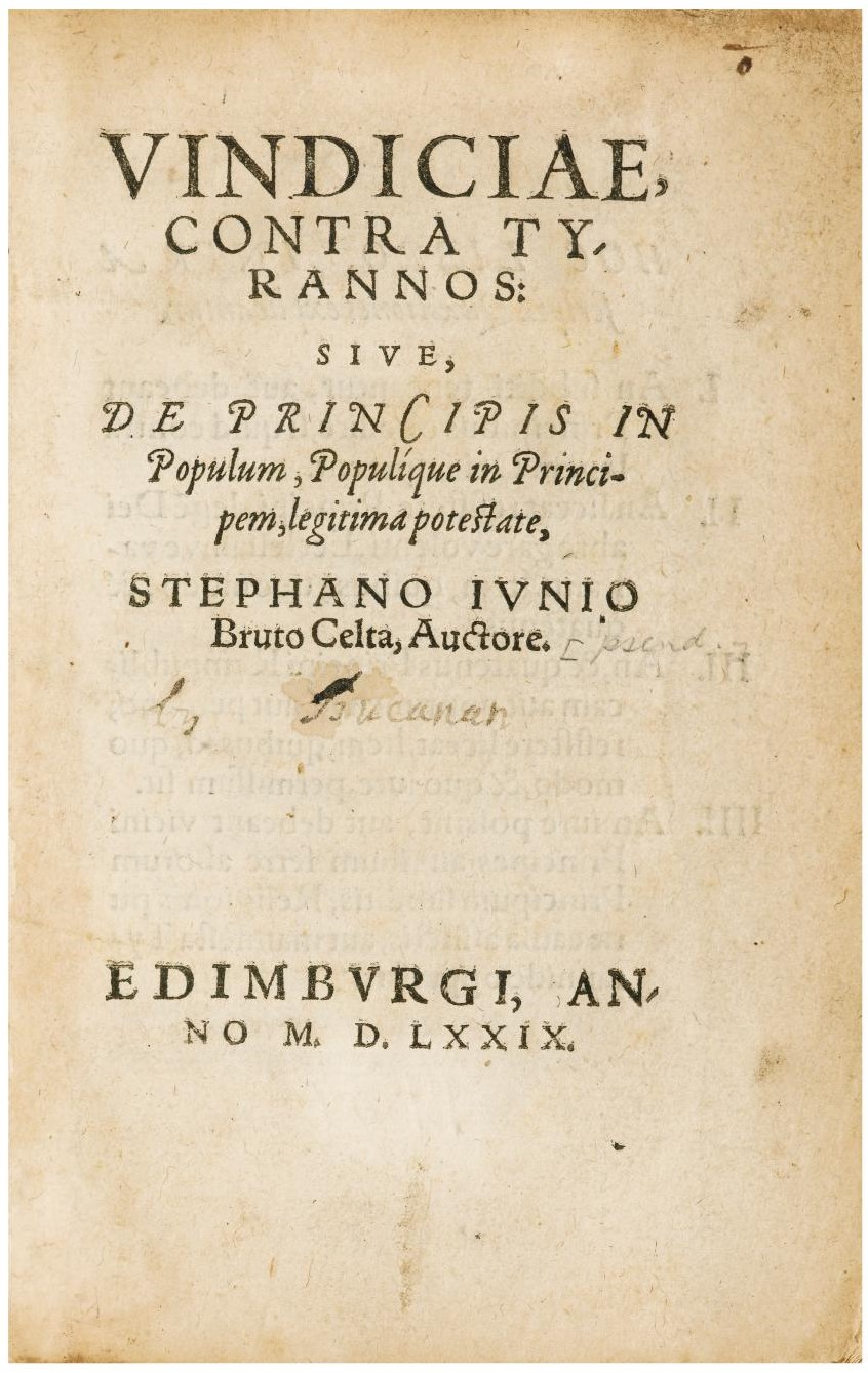 laskdhfsdf